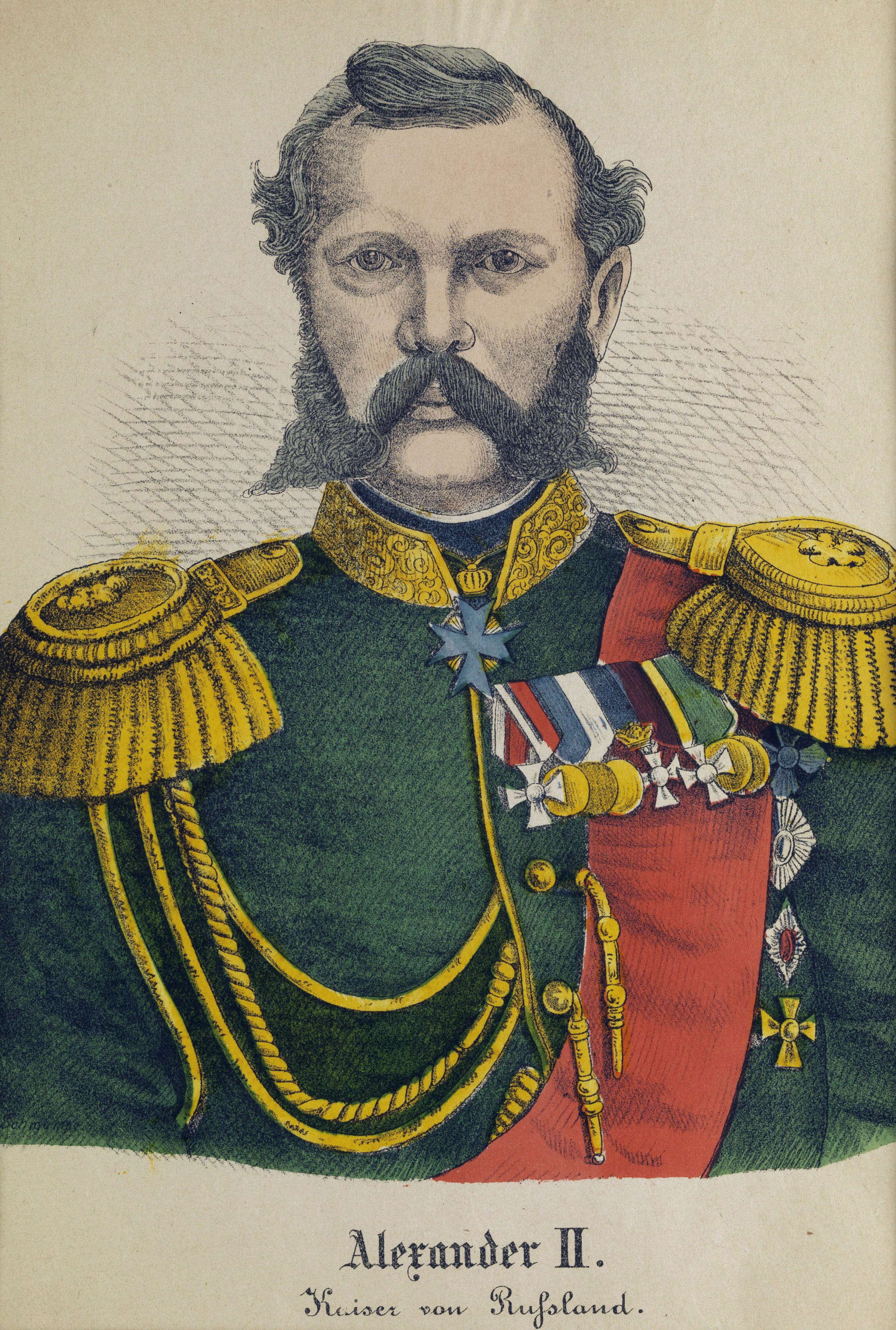 Zar Alexander II., aquarellierte Lithografie. 39 x 27 cm.